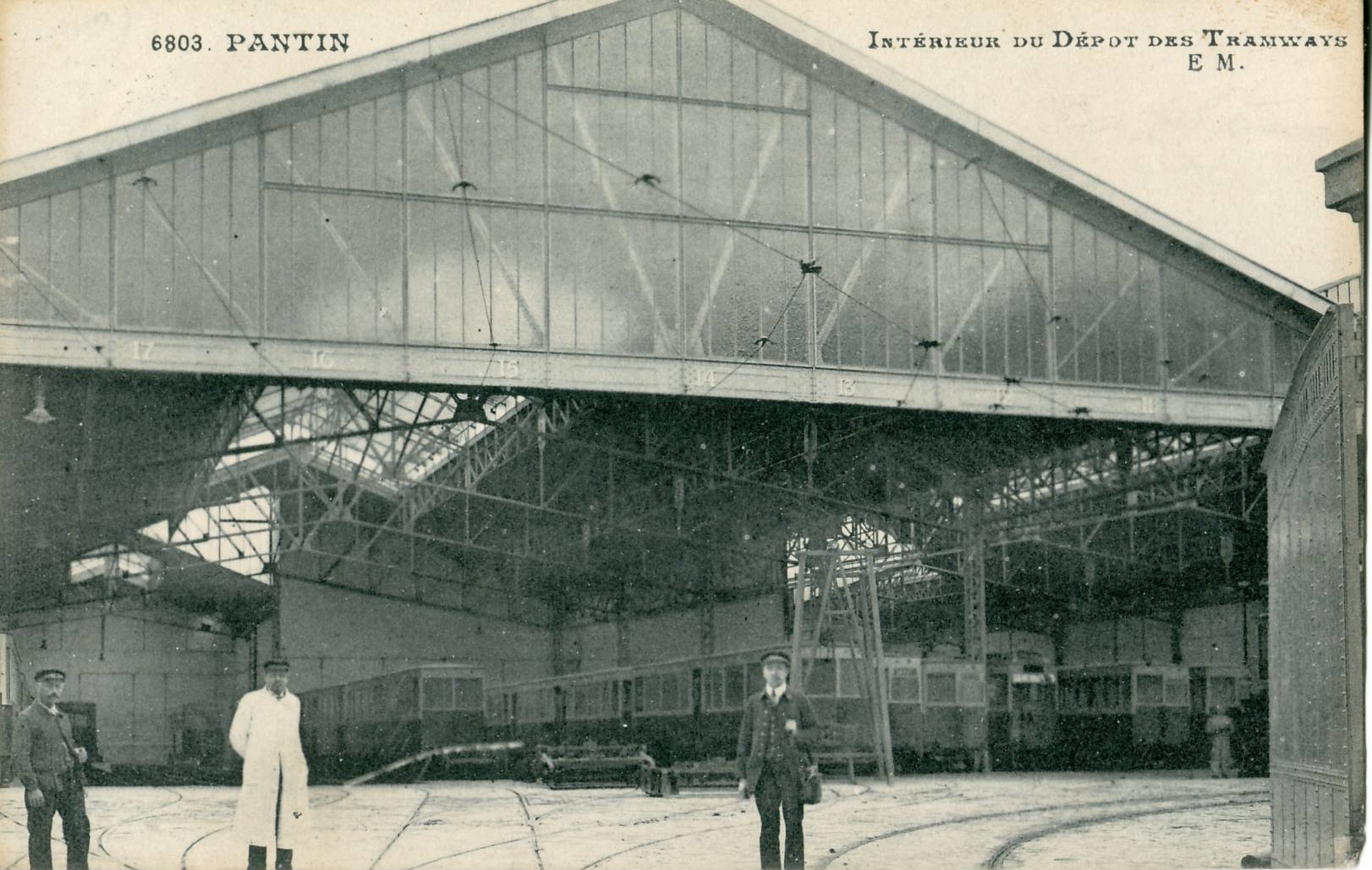 Carte postale ancienne éditée par EM N° 6803PANTIN : Intérieur du Dépot des TramwaysIl s'agit de l'ancien dépot de la Compagnie des tramways de l'Est parisien, absorbée depuis 1921 dans la STCRP